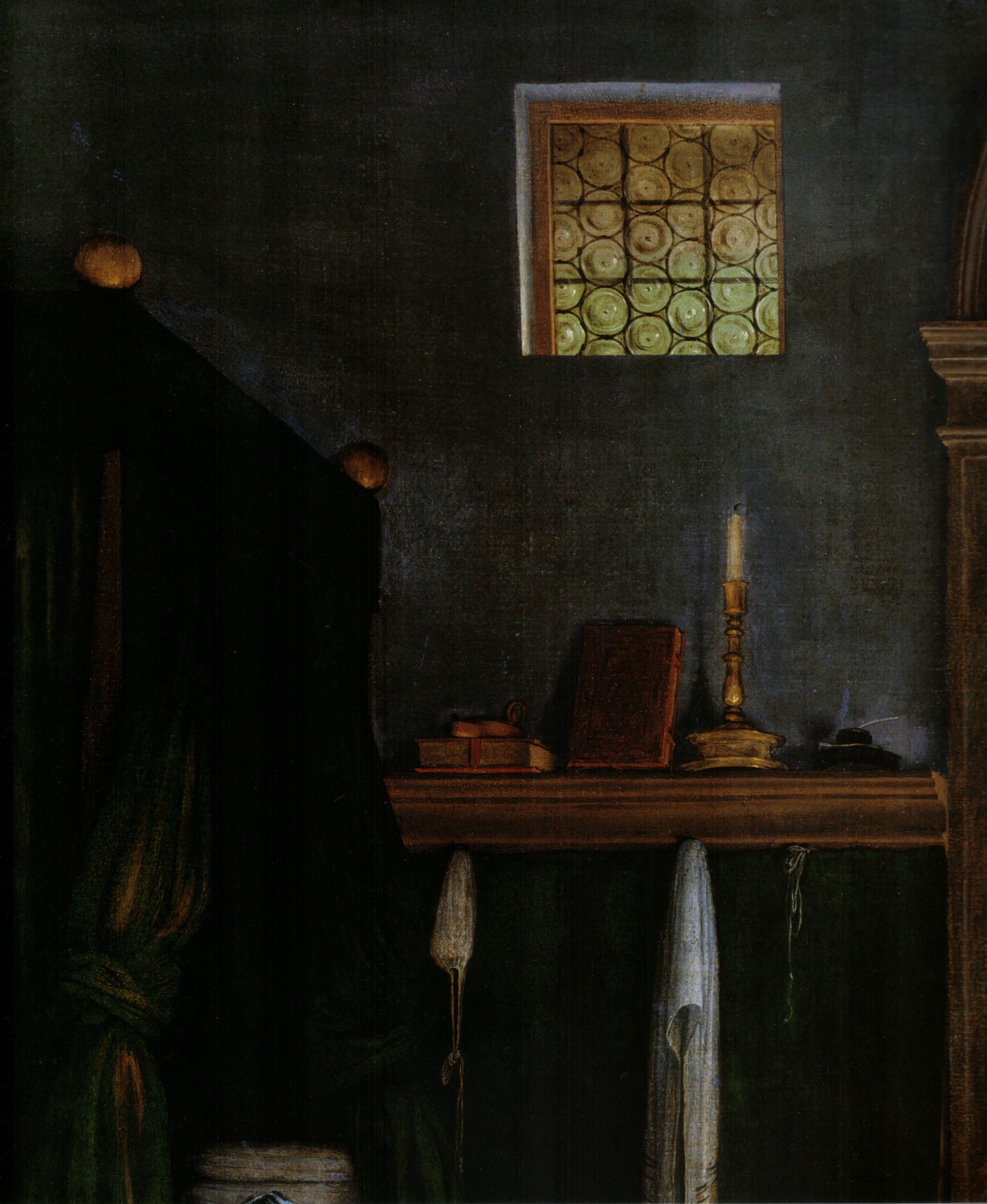 detail